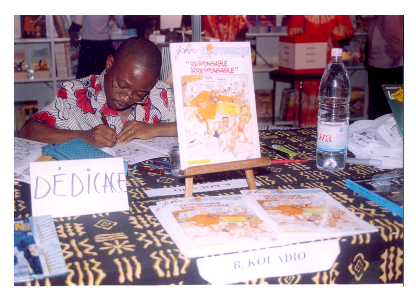 Benjamin Kouadio alis Kbenjamin en séance de dédicace de son album lors du Festival International de de la bande dessinée et du dessin de presse Coco-Bulles en 2003 à Grand-Bassam.